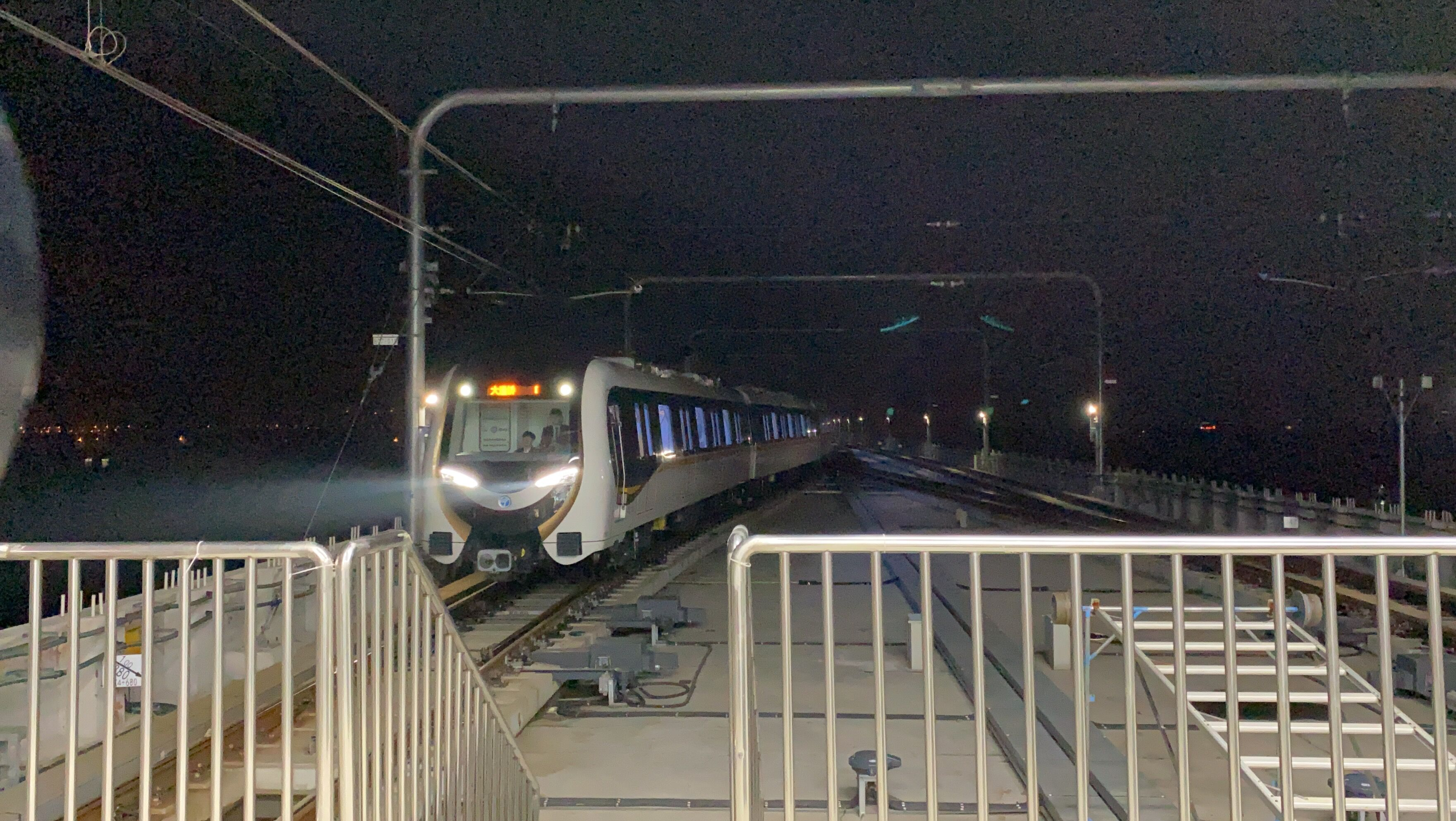 3号线列车在明辉路站折返